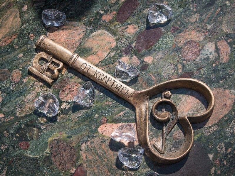 Фото арт об'єкту ключ визнання